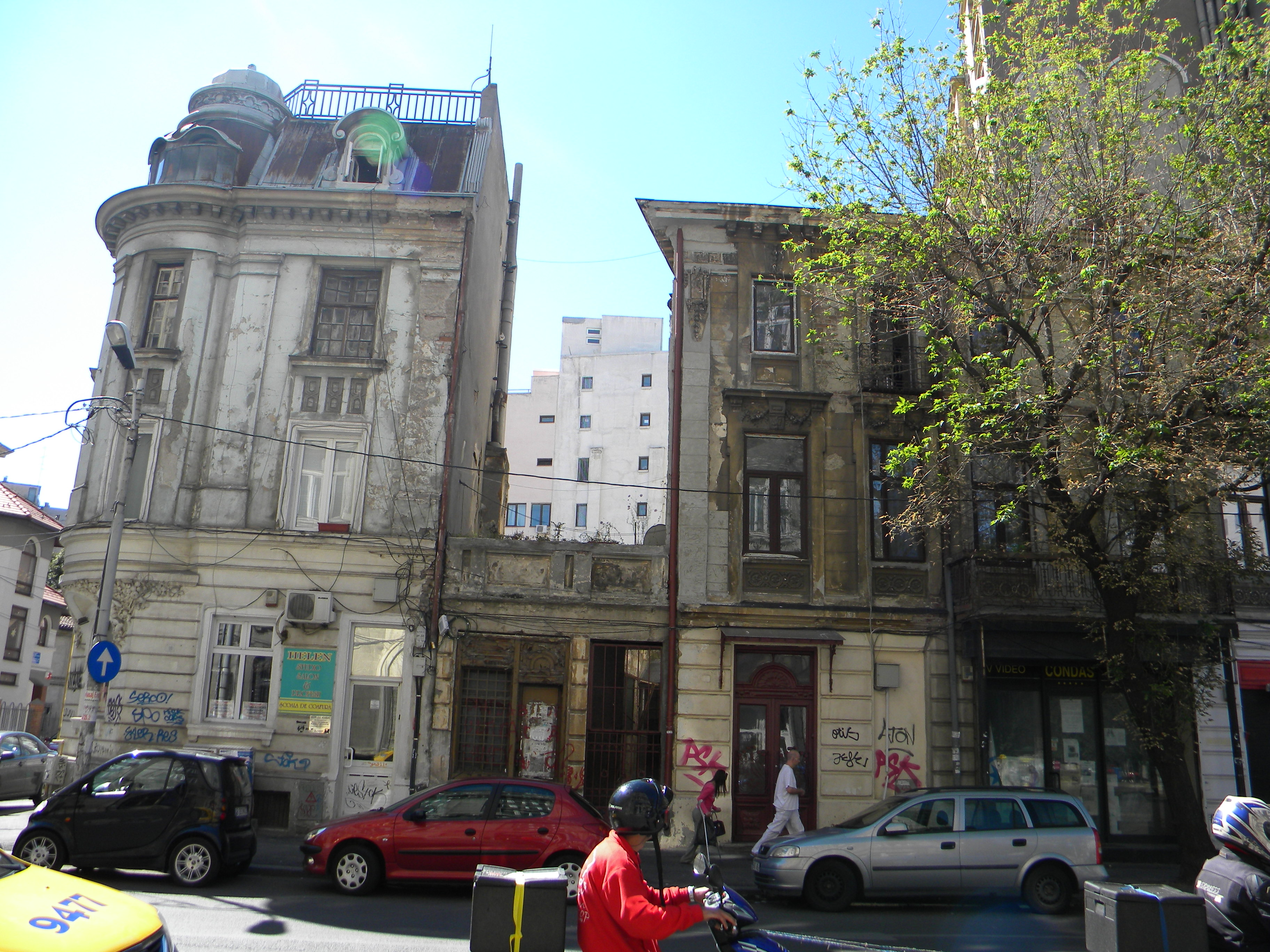 Bucuresti, Romania, Strada Hristo Botev nr. 2 (imobil), sect. 3